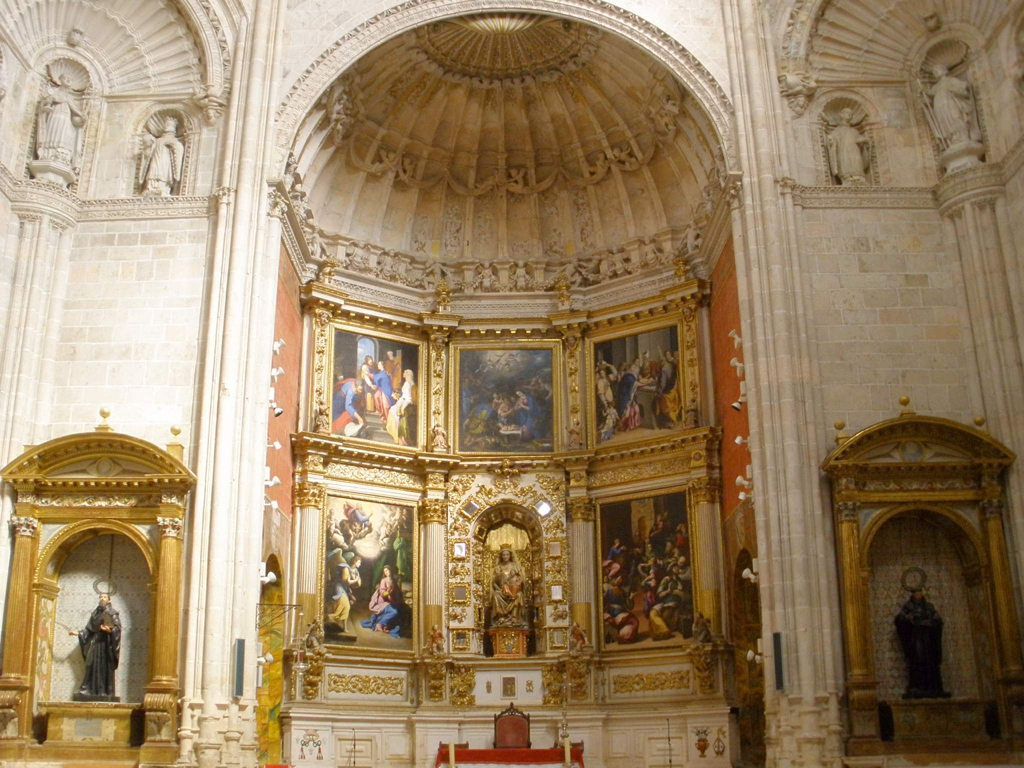 La Vid (Burgos) - Monasterio de Santa María